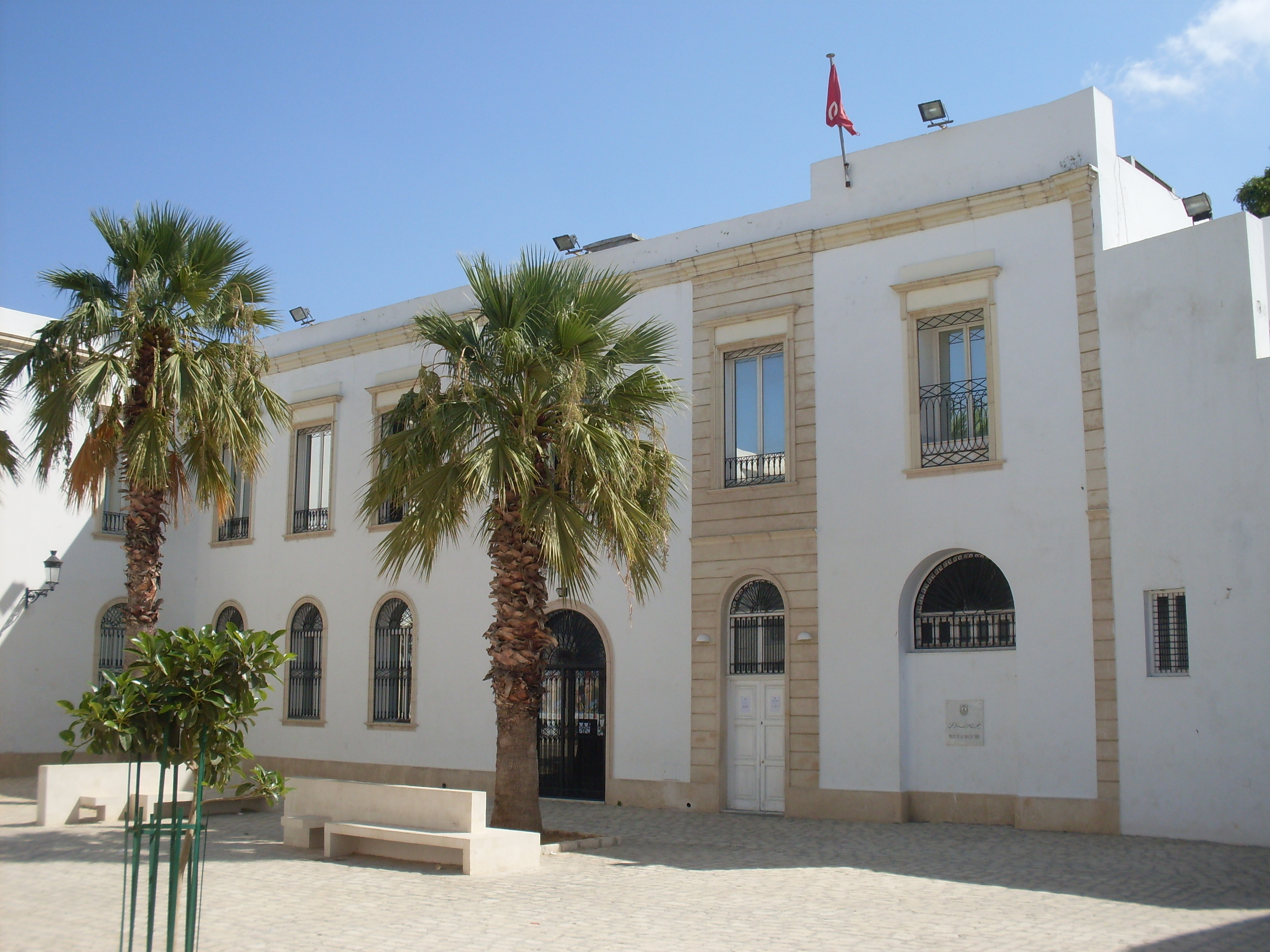 Medina de Tunis, Palais Kheireddine Pacha, actuel musée de Tunis